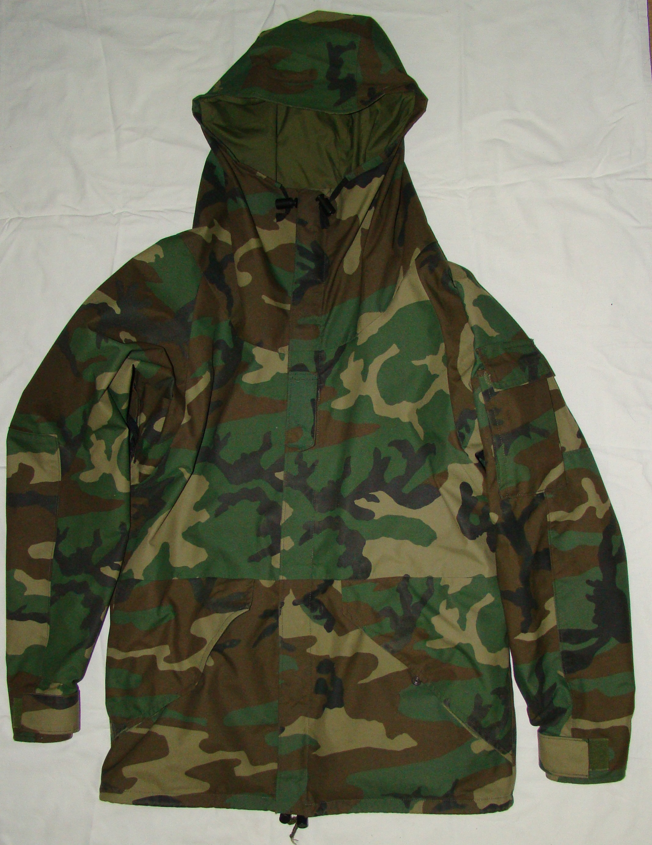 Kurtka goretexowa (warstwa 4) z systemu ECWCS gen. I